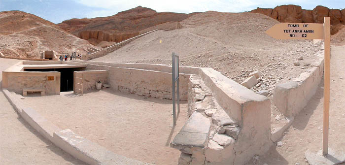 Vhod v Tutankamonovo grobnico, Dolina kraljev v Luksorju, april 2004